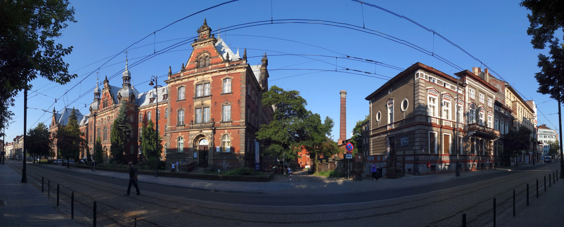 Ulica Dworcowa w Bydgoszczy